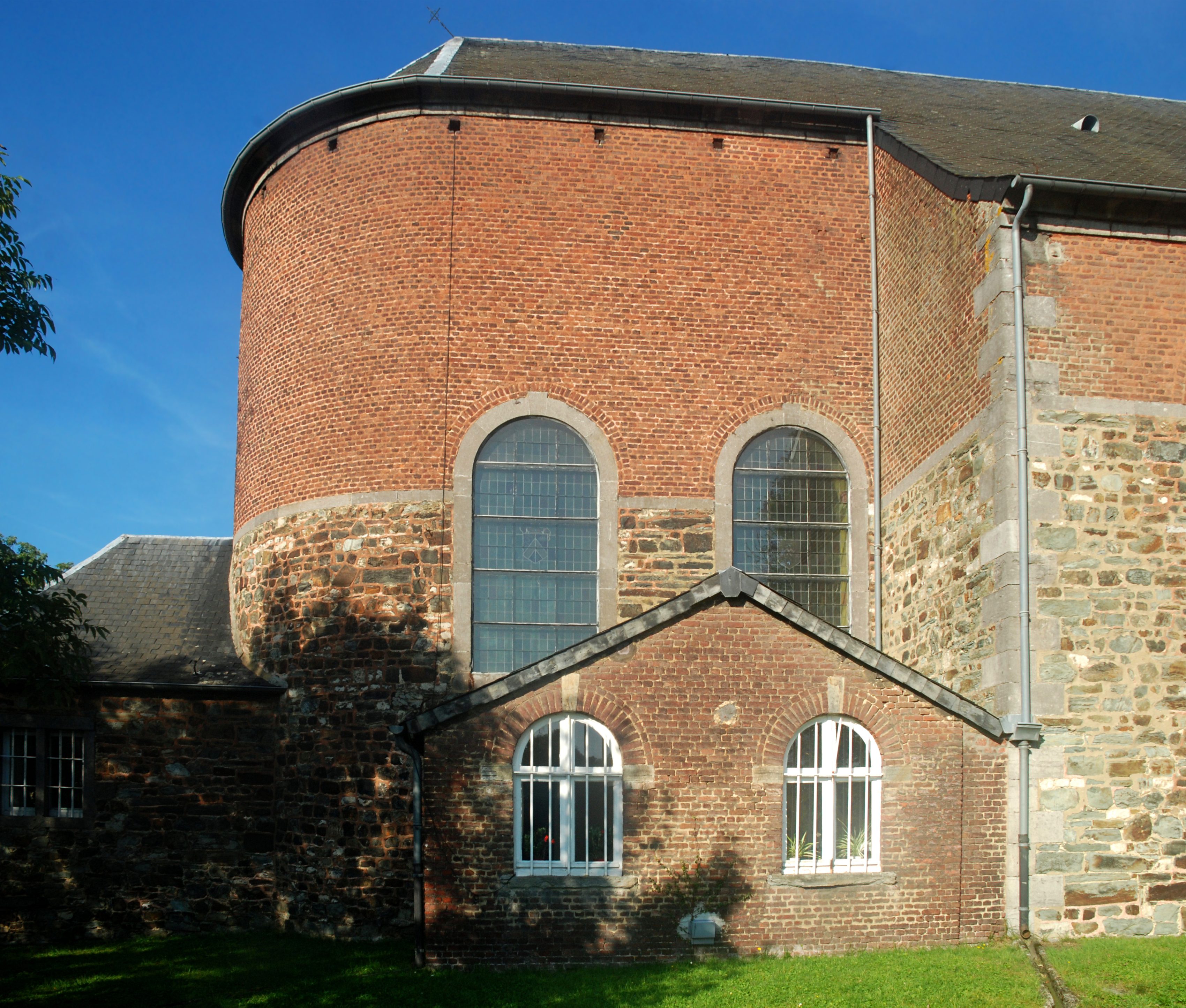 Belgique - Brabant wallon - Mont-Saint-Guibert - Église Saint-Guibert